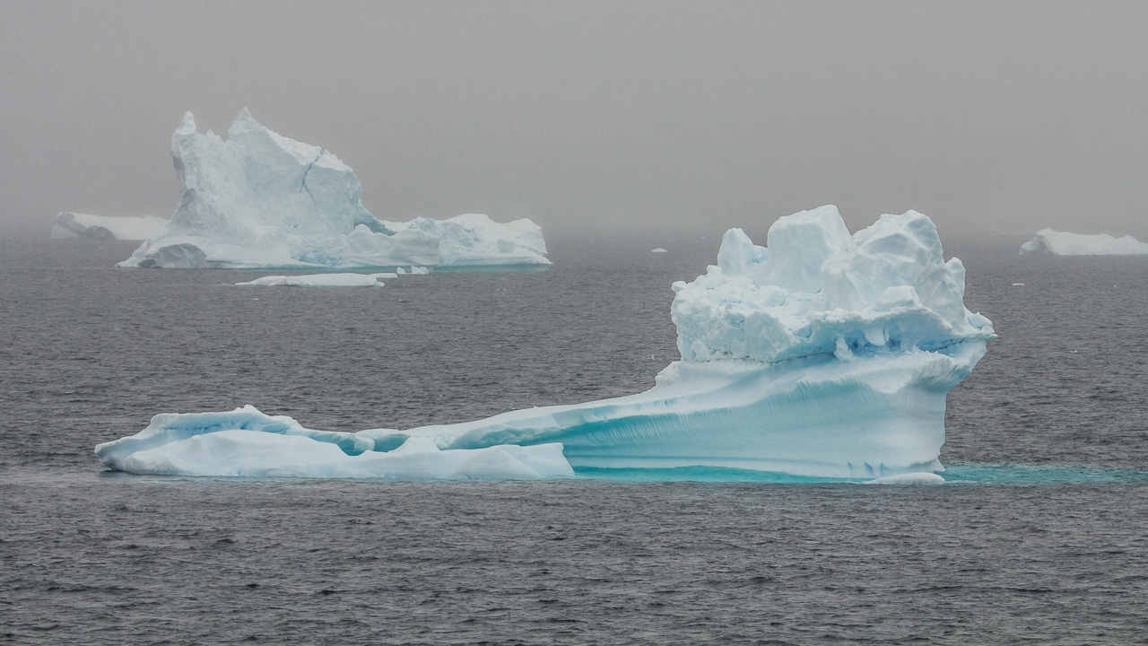 Antarctica